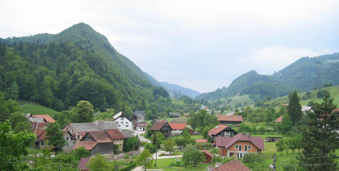 Motnik, village in Slovenia photo:Ziga 19:59, 9 October 2006 (UTC)